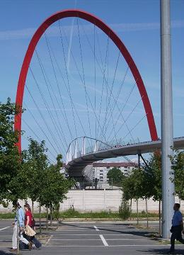 Elegante Brücke beim Olympischen Dorf, Schacholympiade 2006 in Turin.